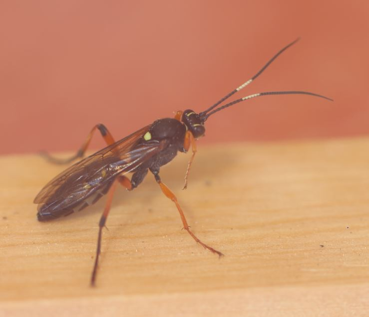 Vierfleck-Höhlenschlupfwespe (Diphyus quadripunctorius), Weibchen, am 18. Juni 2020 südlich von Mannheim